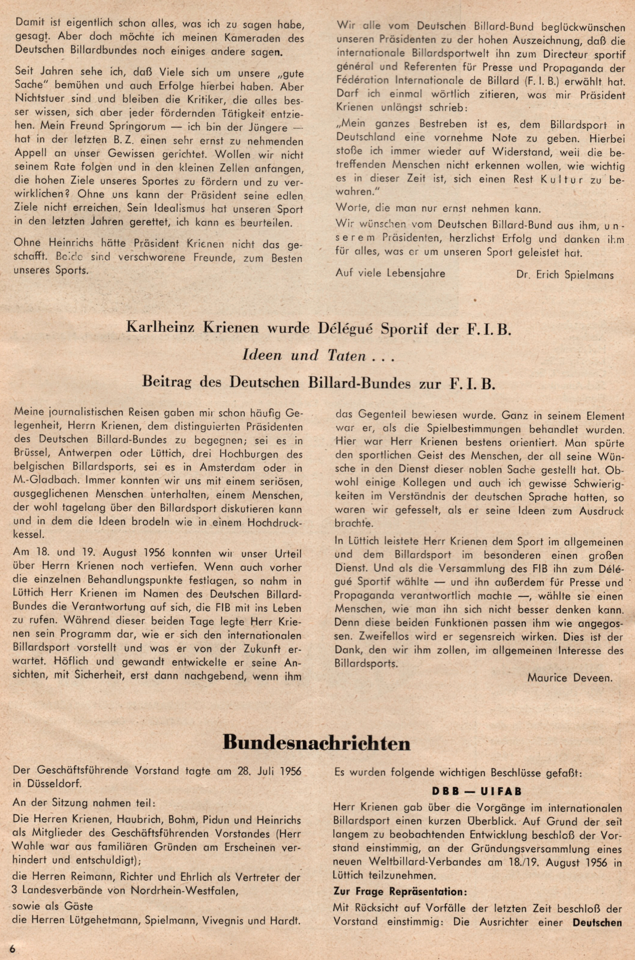 see file name